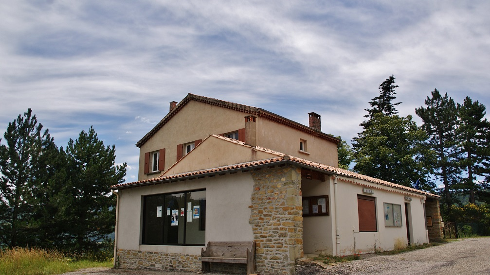 La Mairie